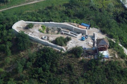 Solymár, Szarkavár - castle, Hungary, aerialphotography